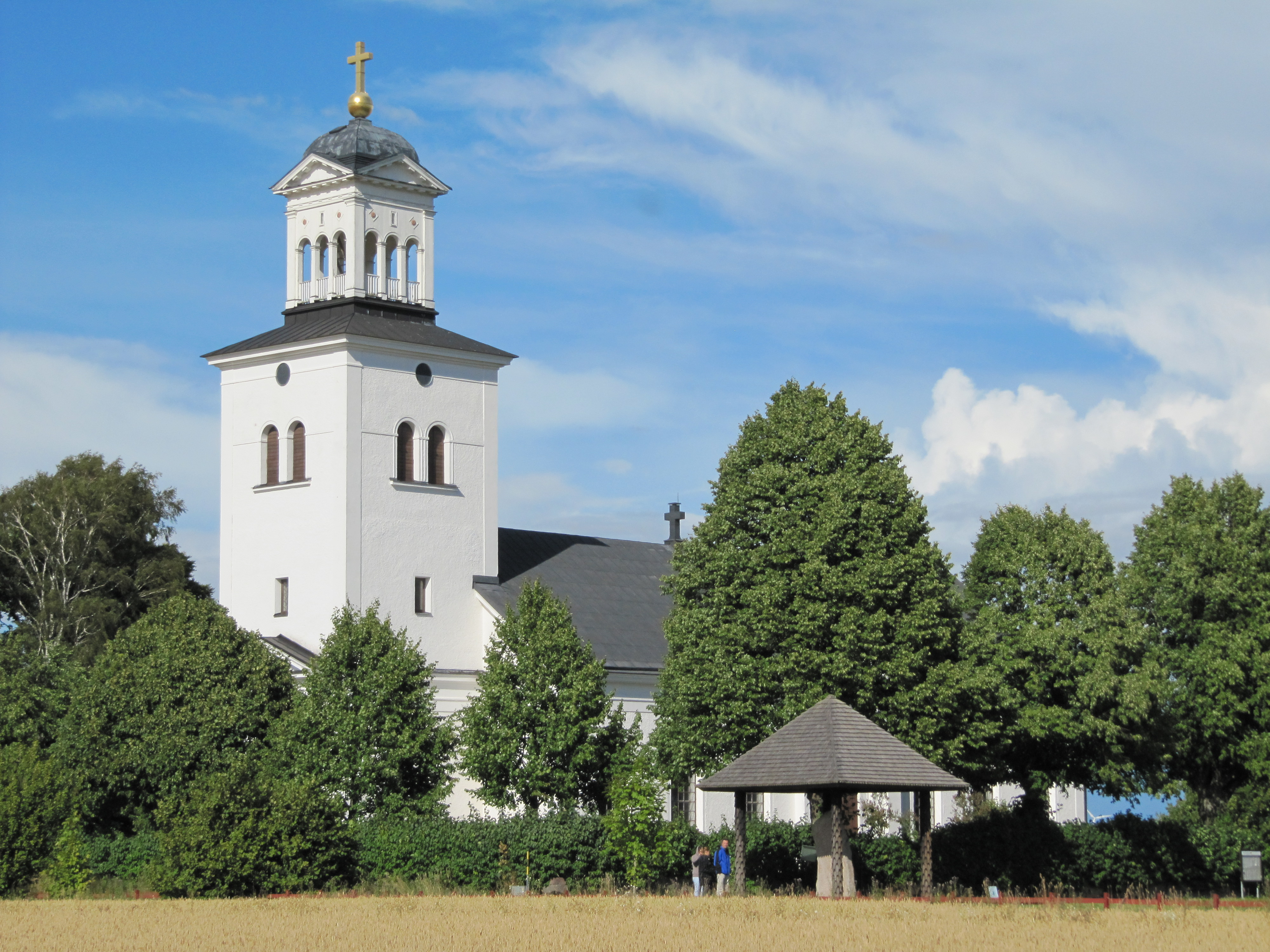 Röks kyrka med Rökstenen